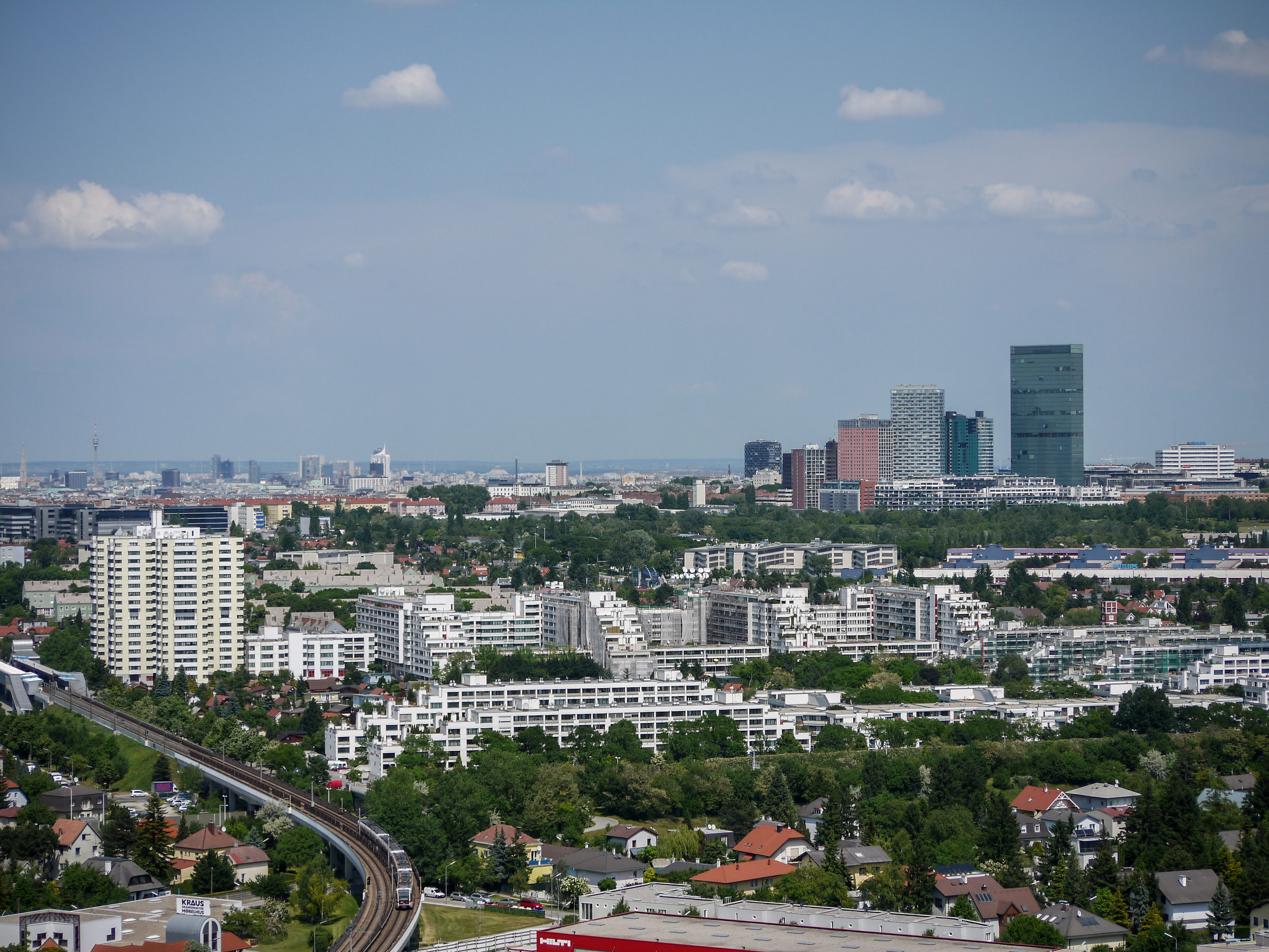 Schöpfwerk von Alterlaa aus gesehen